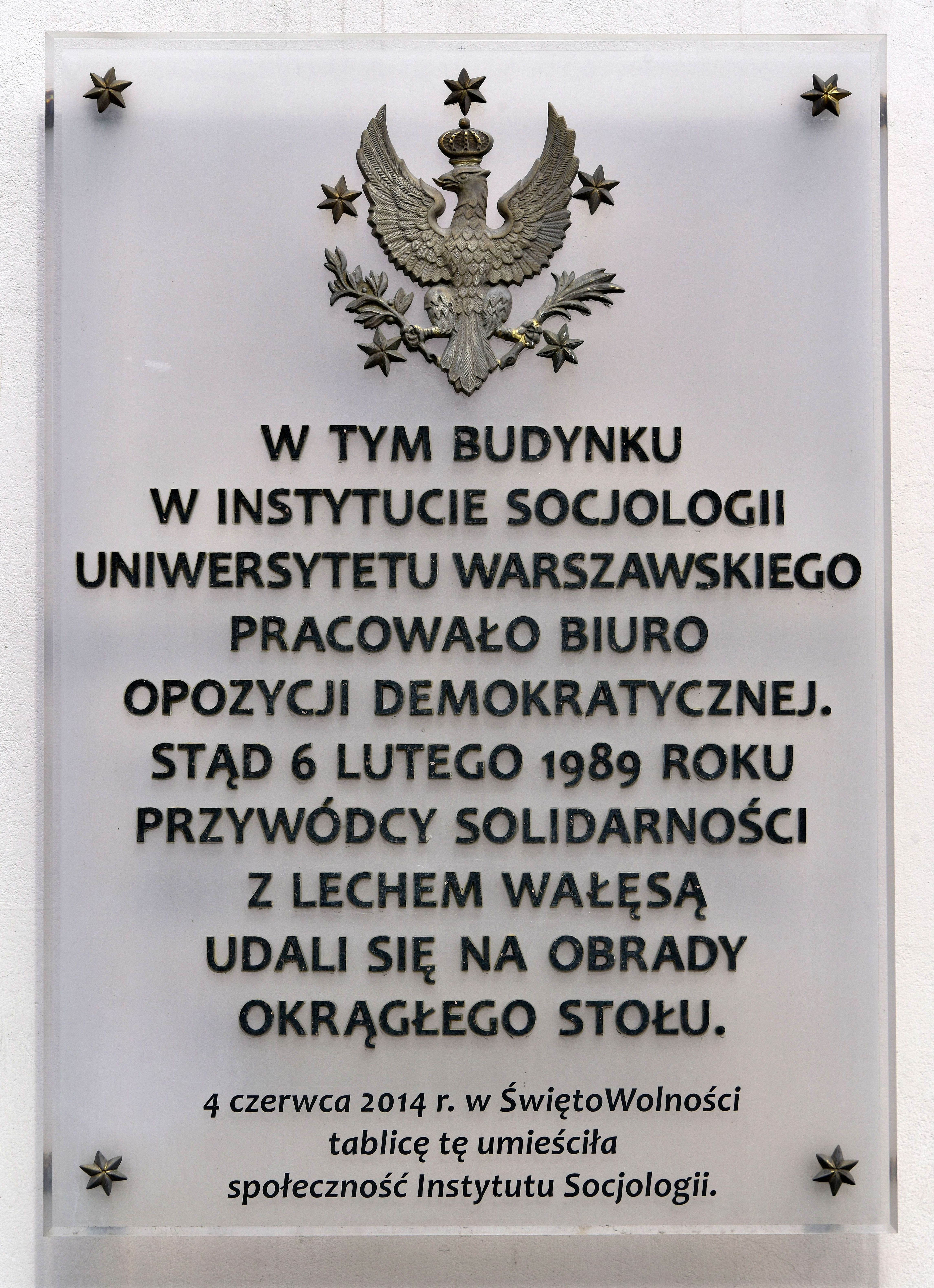 Tablica przy ul. Karowej 18 upamiętniająca spotkanie delegacji strony solidarnościowej 6 lutego 1989 roku w sali wykładowej mieszczącego się w budynku Instytutu Socjologii UW przed udaniem się na obrady Okrągłego Stołu